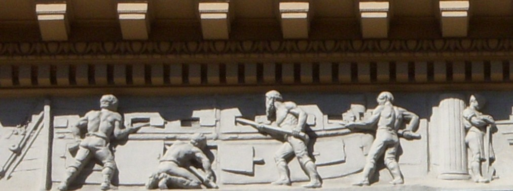 Fris på Gamla Jernkontorets hus på Norrmalm i Stockholm